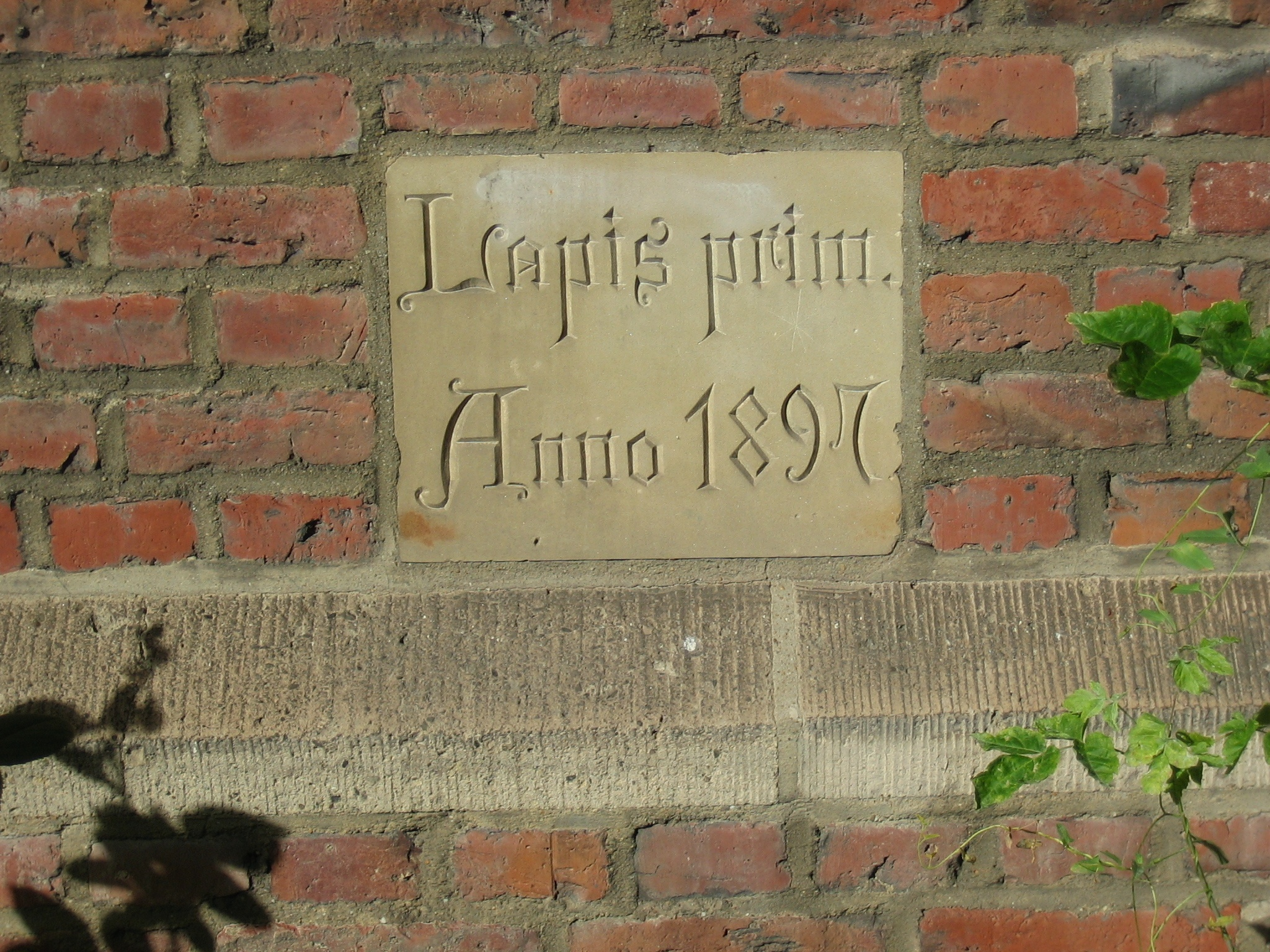 Grundstein in der Apsis der Hippolytuskirche in Gelsenkirchen-Horst